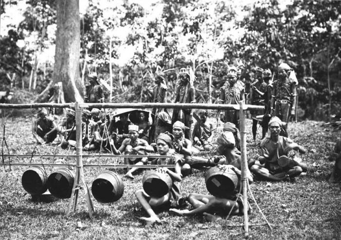 Foto. Moealang Dajaks maken muziek tijdens het bezoek van Gouverneur-Generaal J.P. Graaf van Limburg Stirum aan Borneo